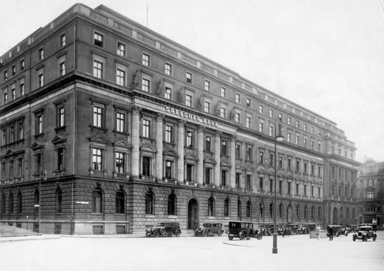 Zentralbild/Archiv Berlin 1926 Das Hauptverwaltungsgebäude der Dresdner Bank in der Behrenstraße. Nr. 35-39